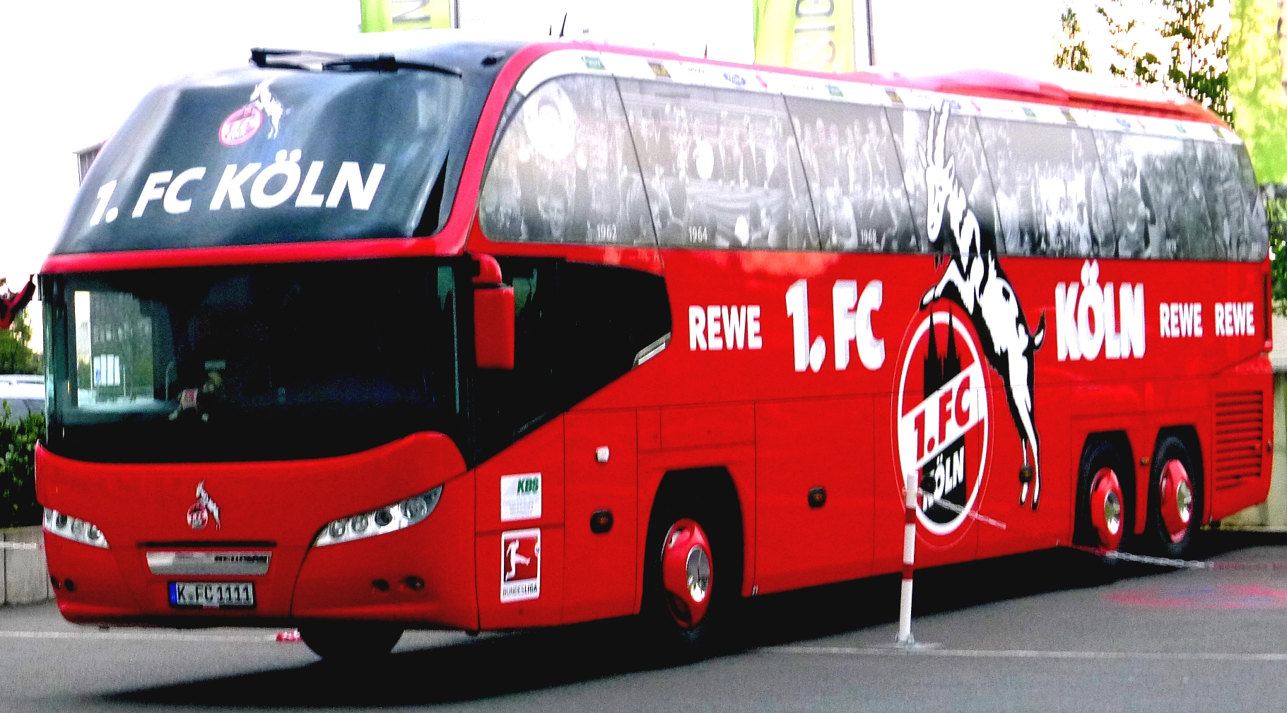 Mannschaftsbus des 1. FC Köln, aufgenommen in Köln